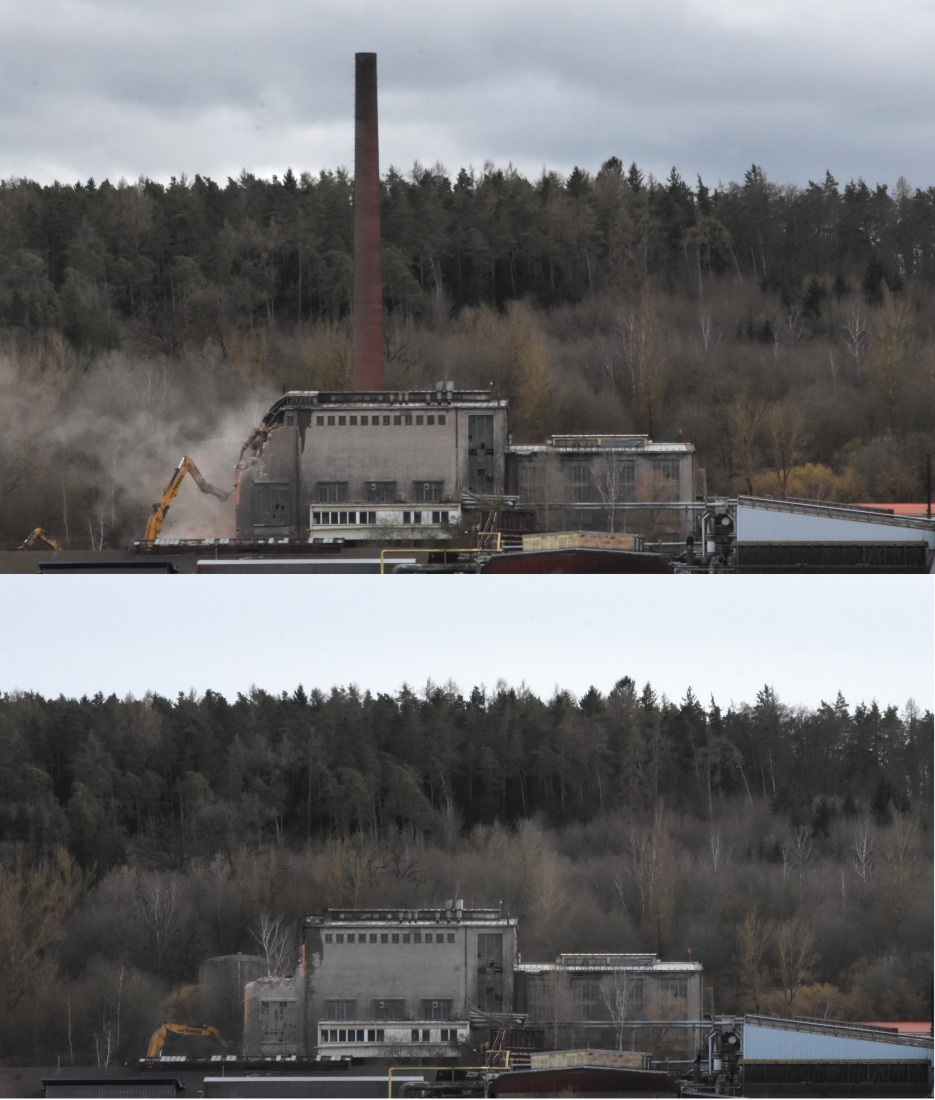 Maxhuette Kraftwerk Abriss 2020